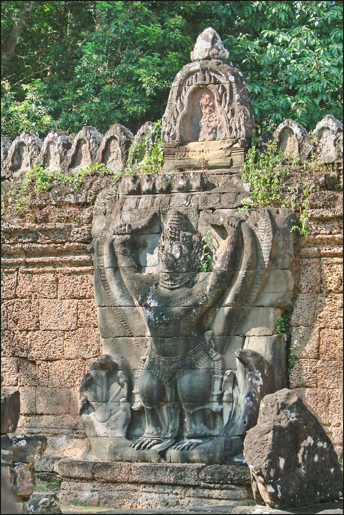 Garuda sur le mur d'enceinte extérieure de Preah Khan ________________ Preah Khan (ou Prah Khan) est un temple construit sous le règne de Jayavarman VII (1181-1218), Il est consacré au culte bouddhique du Mahâyâna. Il a été inauguré en 1191. Preah Khan signifie "Epée sacrée", son nom d'origine est "capitale de la victoire" car il est construit sur le lieu de la bataille victorieuse des khmers contre les chams. Il est entouré d'une enceinte rectangulaire en latérite de 800 m sur 700 m, bordée de douves de 50 m. Les chaussées-digues, qui mènent aux bâtiments d'entrée : les gopura, sont ornées de géants gardiens, les bons Yaksha à gauche (Deva) et les mauvais Yaksha à droite (Asura). Ces derniers tiennent le serpent-Nâga qui sert de balustrade. Les représentations de Bouddha en méditation ont été buchées au XIIIè siècle par des fanatiques hindouistes. La tour-sanctuaire centrale abritait la statue du dieu bouddhiste Lokeshvara, en mémoire du père du roi. Les hindouistes auraient remplacé cette statue par un linga